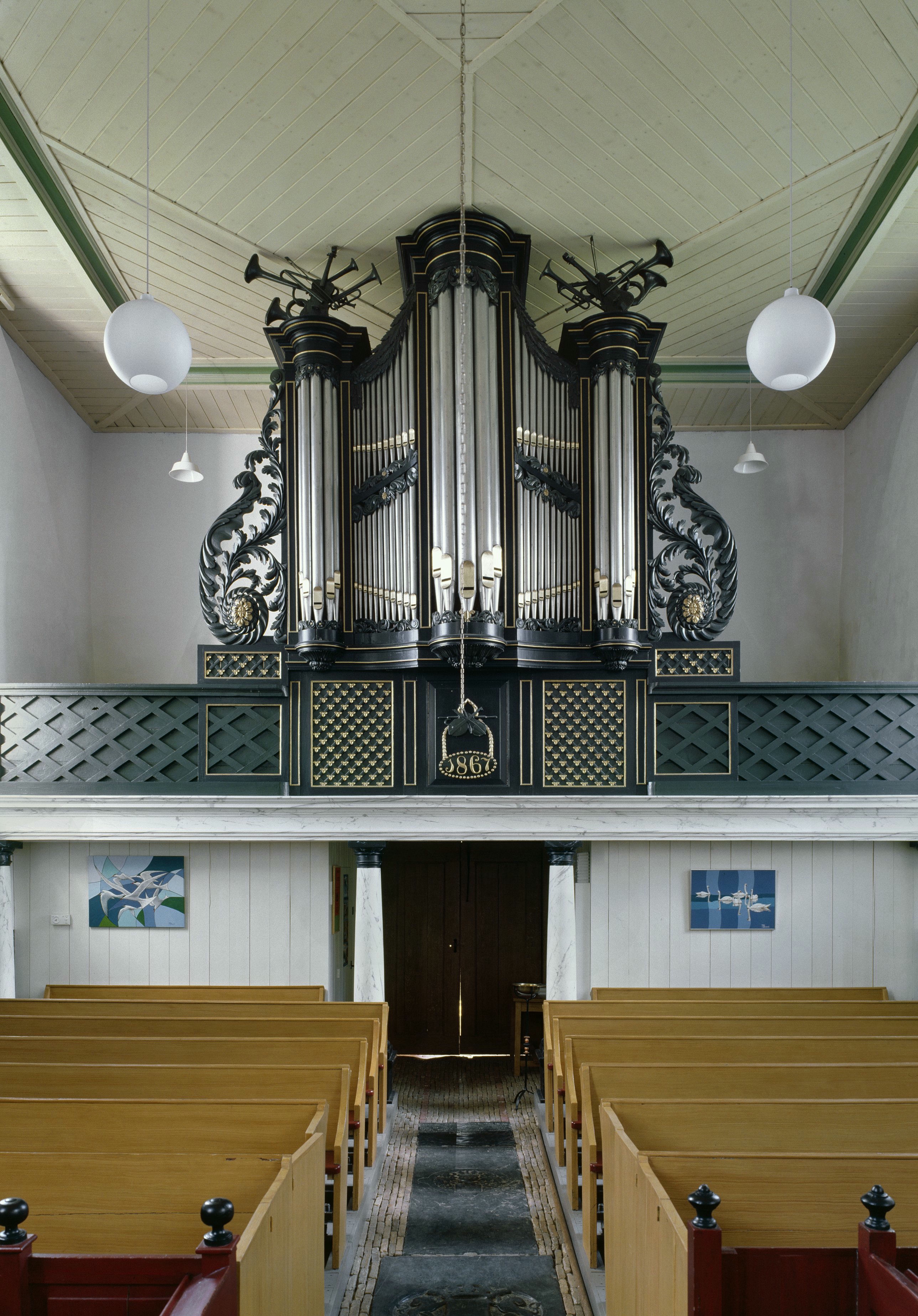 Voormalige Hervormde kerk: Interieur, aanzicht orgel, orgelnummer 1471 (opmerking: Gefotografeerd voor Het Historische Orgel in Nederland 1865-1872)